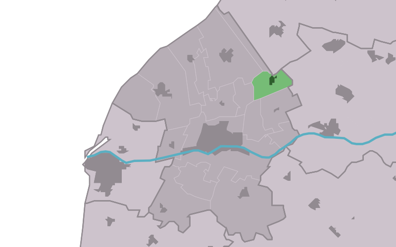 Kaartsje fan himrik fan Rie